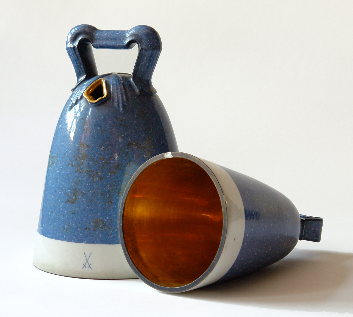 Böttcherstraße Bremen, Haus des Glockenspiels: zwei von sieben erhaltenen Meißner-Porzellanglocken von 1934 (erstes Glockenspiel)